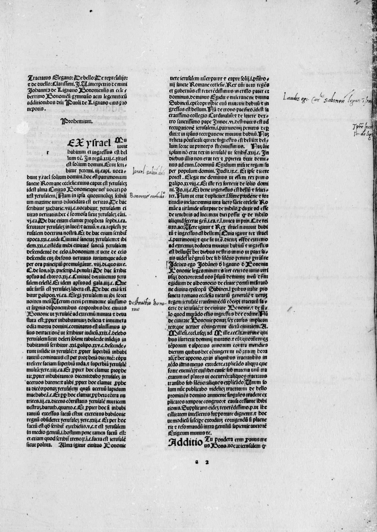 carta a2r